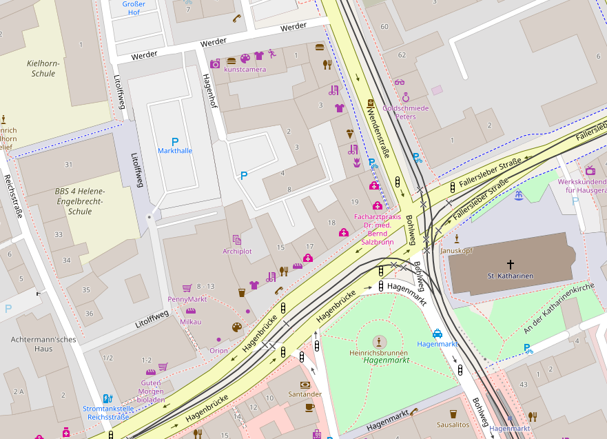 Lage der ehemaligen Markthalle in Braunschweig. Ausschnitt aus OpenStreetMap